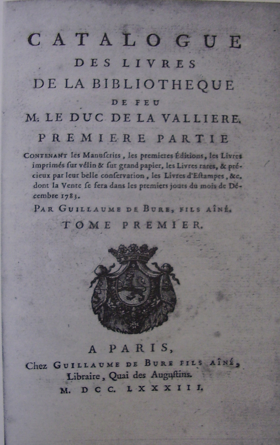 Book sell catatalogue of duc de La Vallière